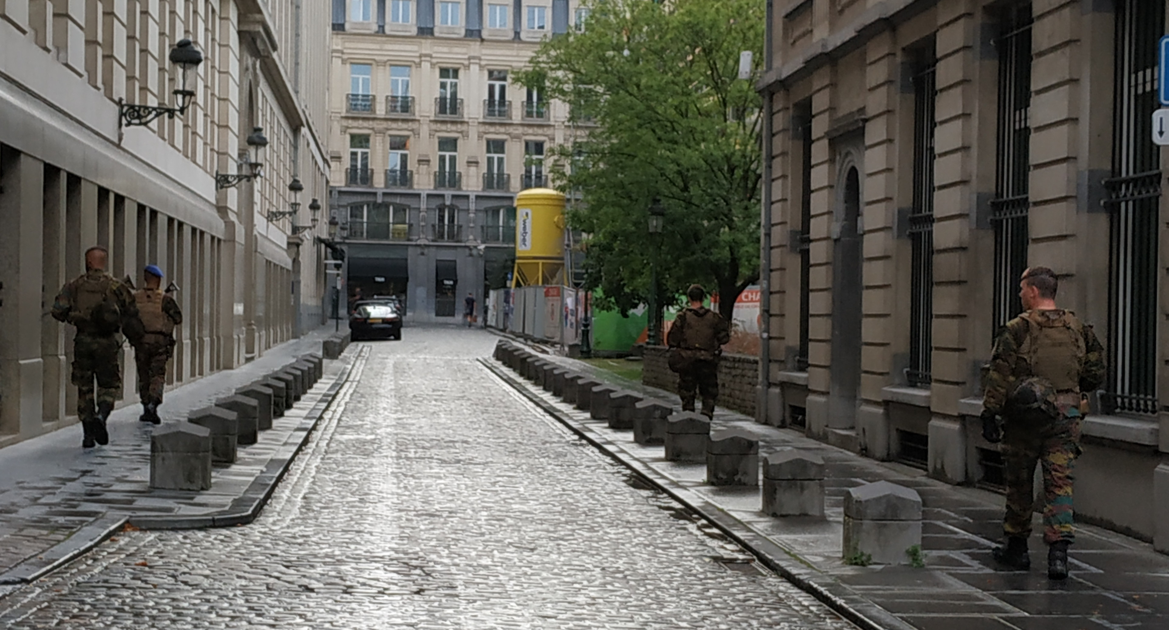 Militaires belges patrouillant à Bruxelles dans le cadre de l'opération Vigilant Guardian - OVG